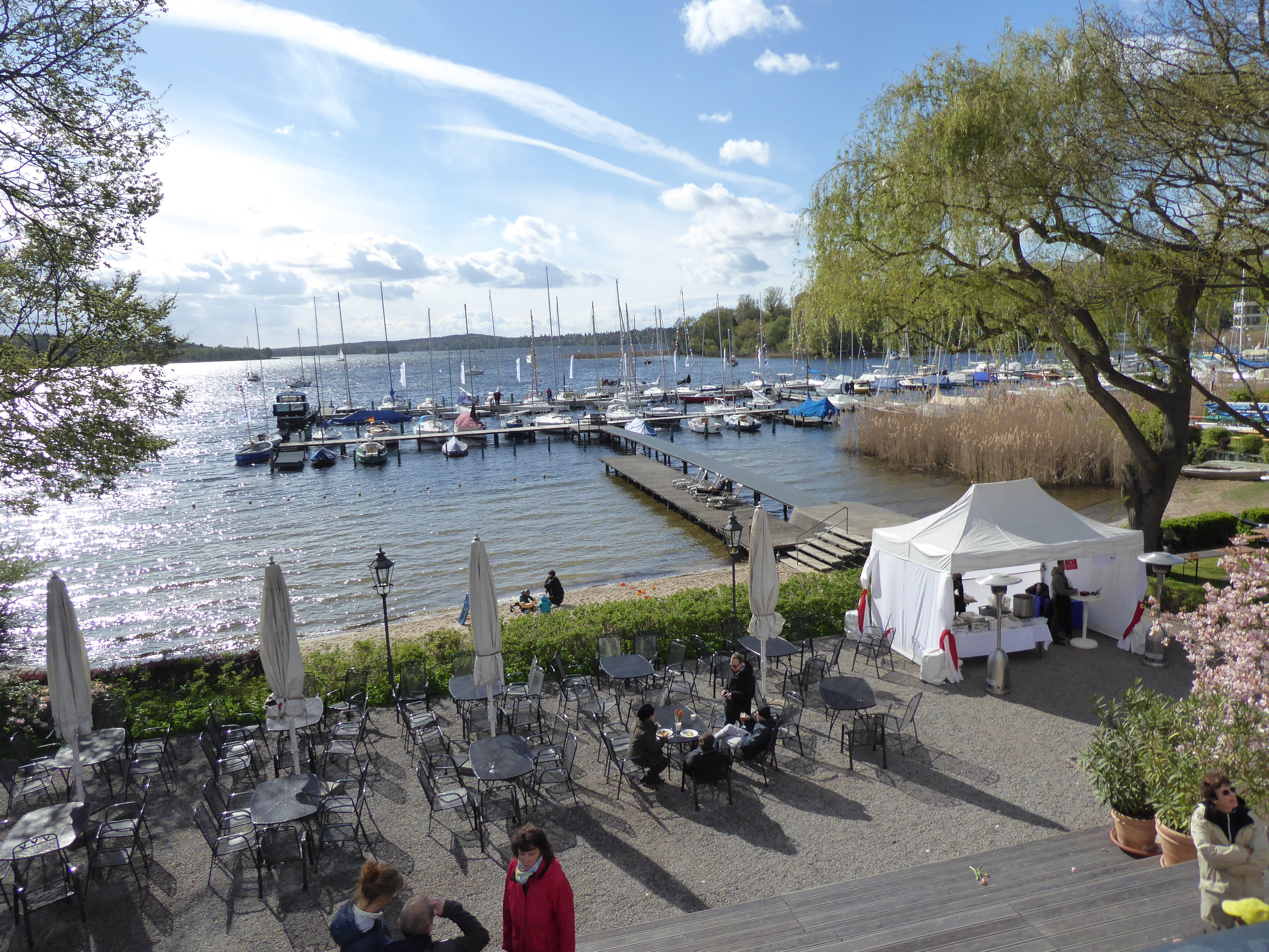 Nikolassee Berliner Yacht-Club Ansegeln 2017 Blick über den Hafen